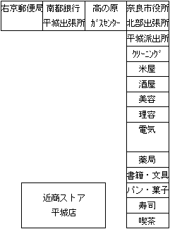 GIMPで制作